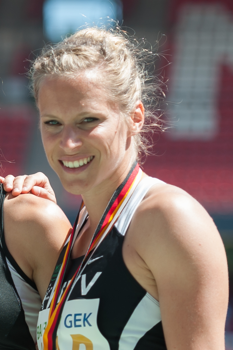 Deutsche Leichtathletik-Meisterschaften 2015: 4x100m Staffel Frauen BA-MT Mannheim - Verena Sailer